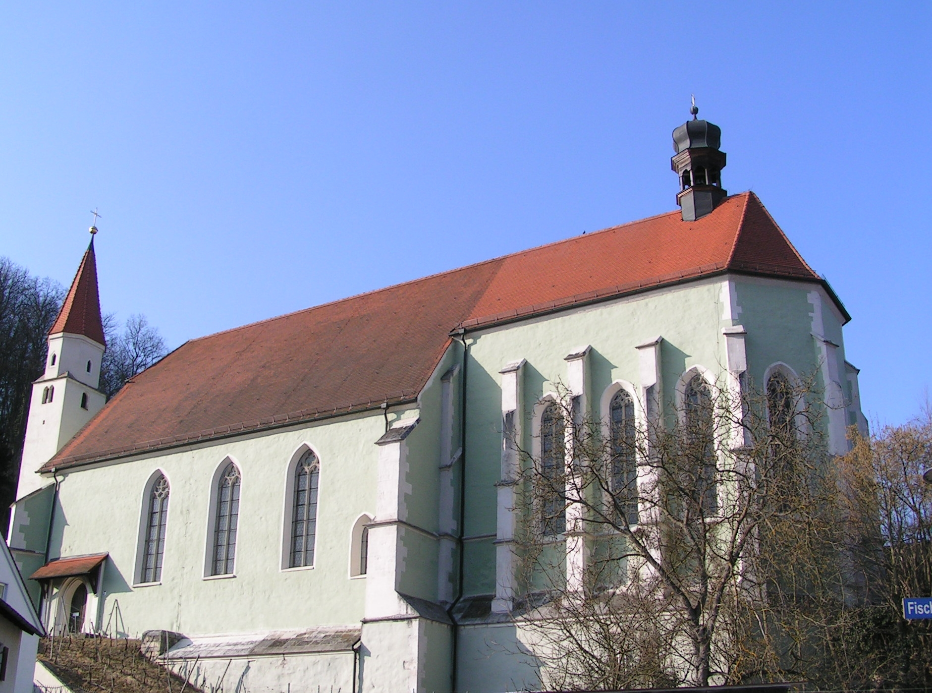 Stadt Kelheim, Niederbayern: ehemalige Franziskanerkirche